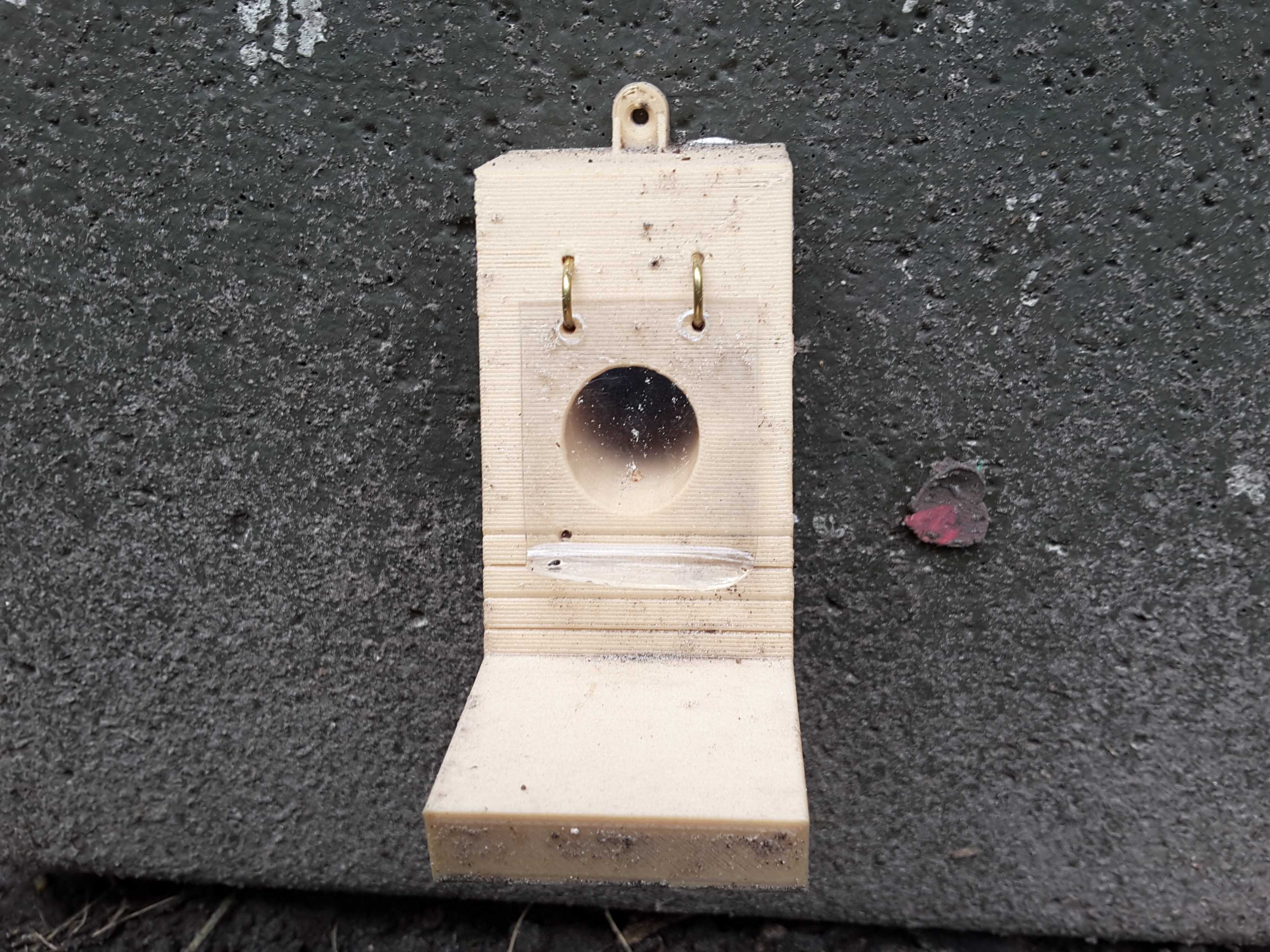 Hummelklappe für Hummelnistkästen